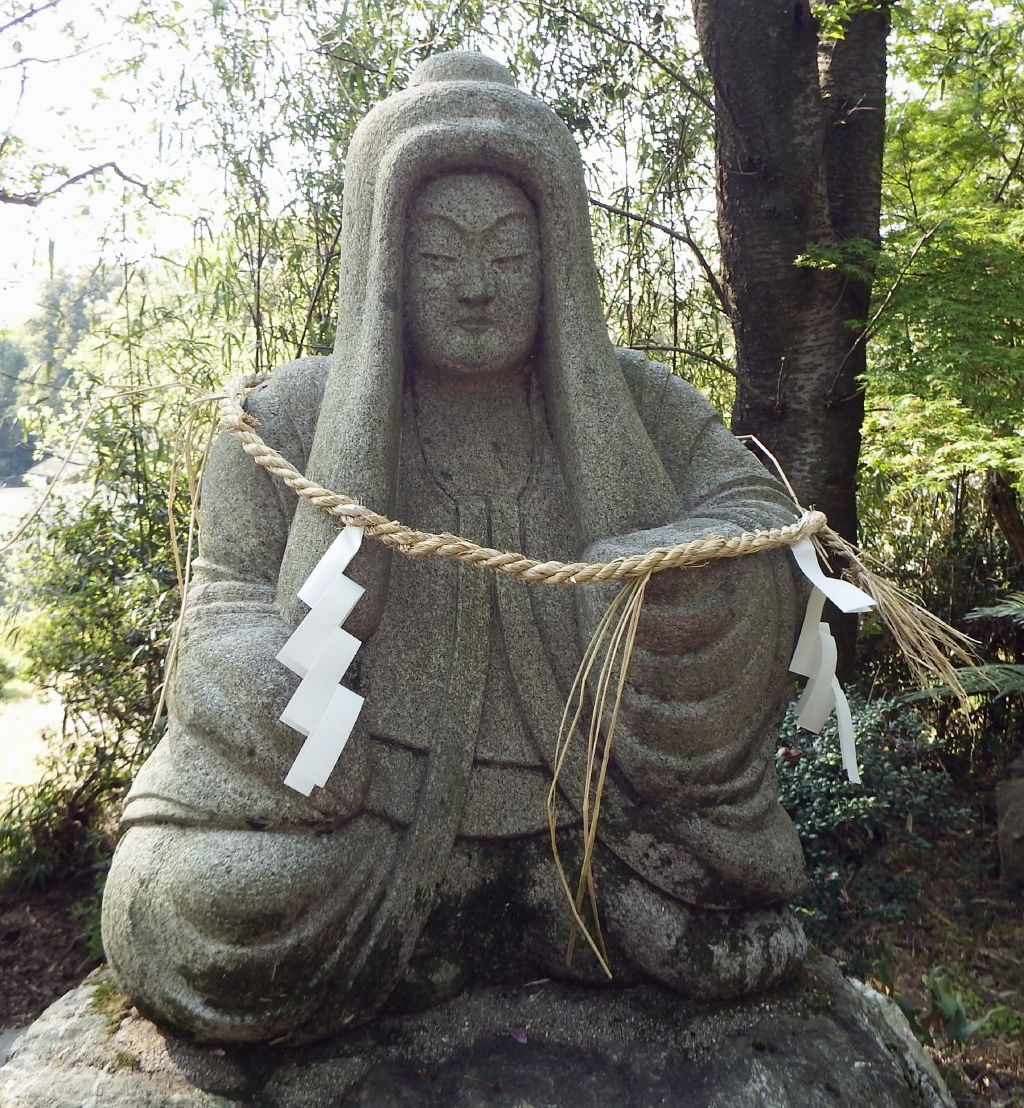 石岡神社の石像